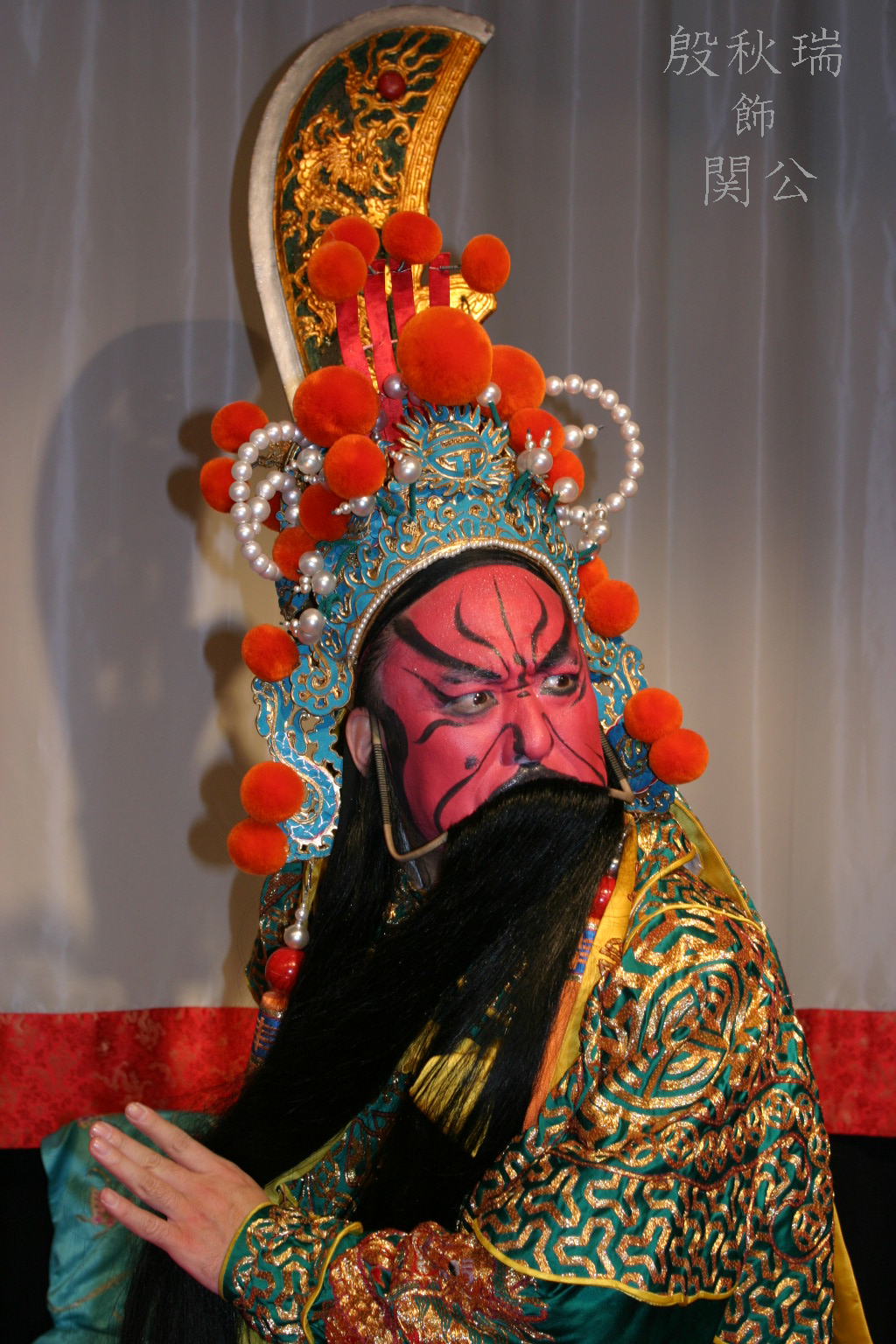 京劇俳優・殷秋瑞氏が、京劇の関羽に扮した写真。 Beijing opera actor Mr.YIN Qiurui is Guan Yu.